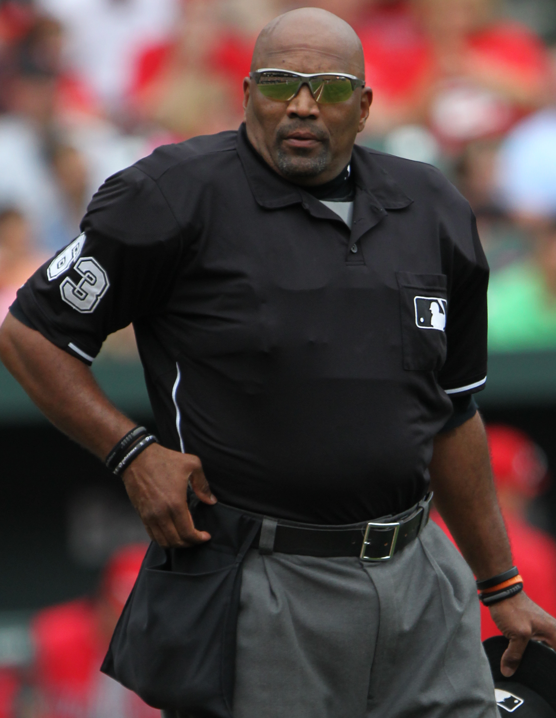 MLB umpire Laz Díaz - Angels at Orioles September 18, 2011